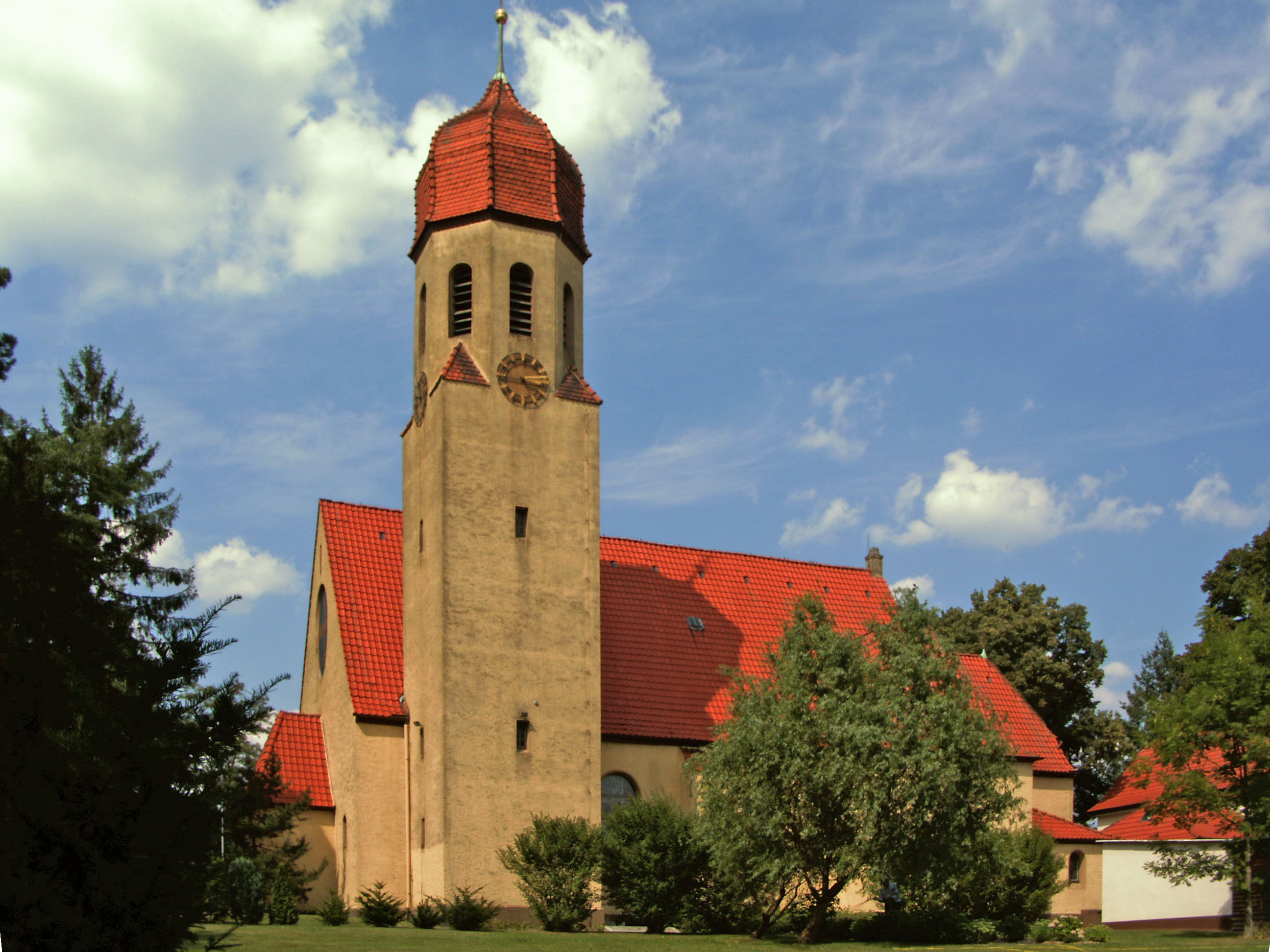 Katholische Kirche St. Bernward in Gifhorn